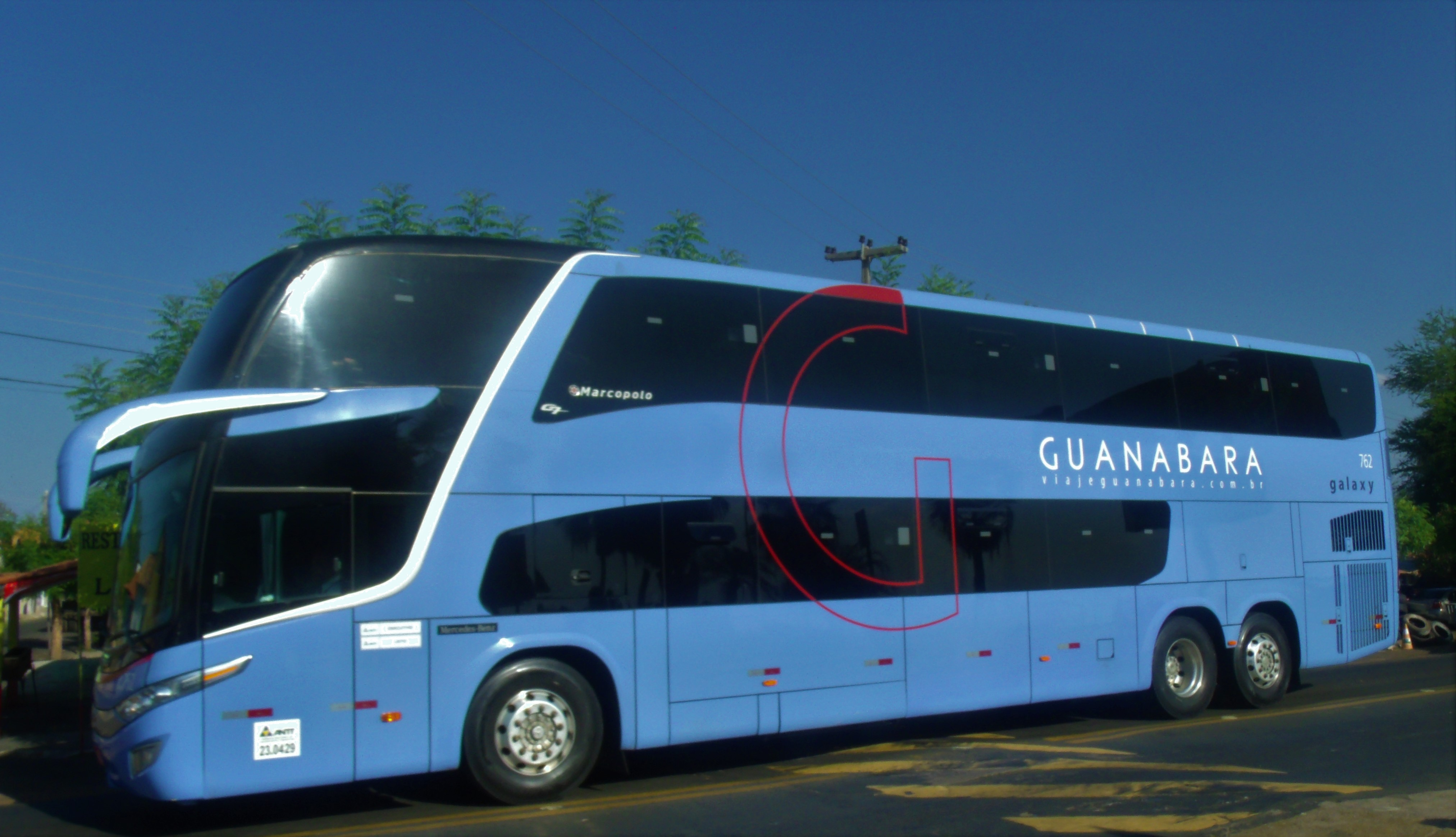 Busão da Guanabara em rodovia federal no Piauí.